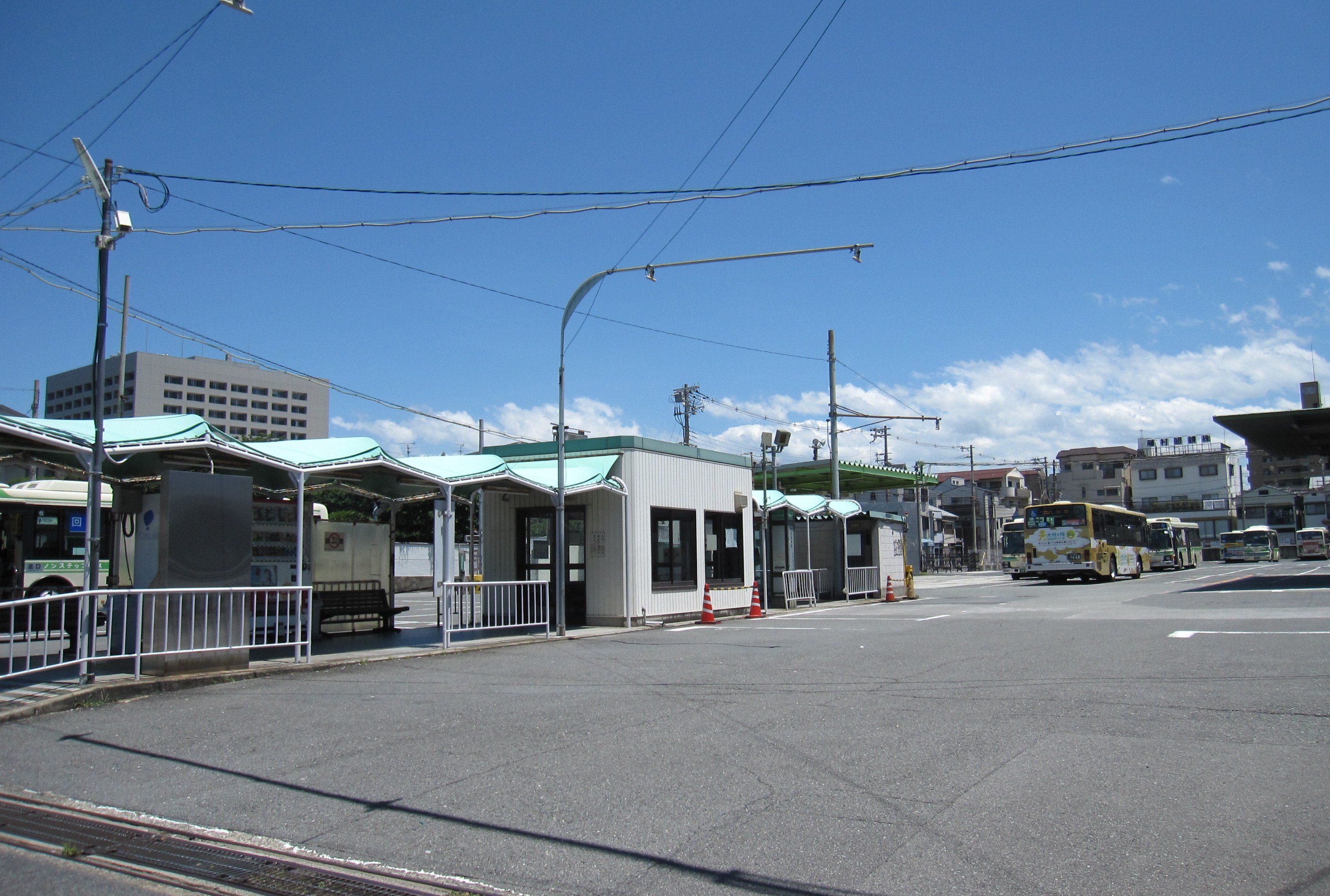 大阪市営バス住吉営業所